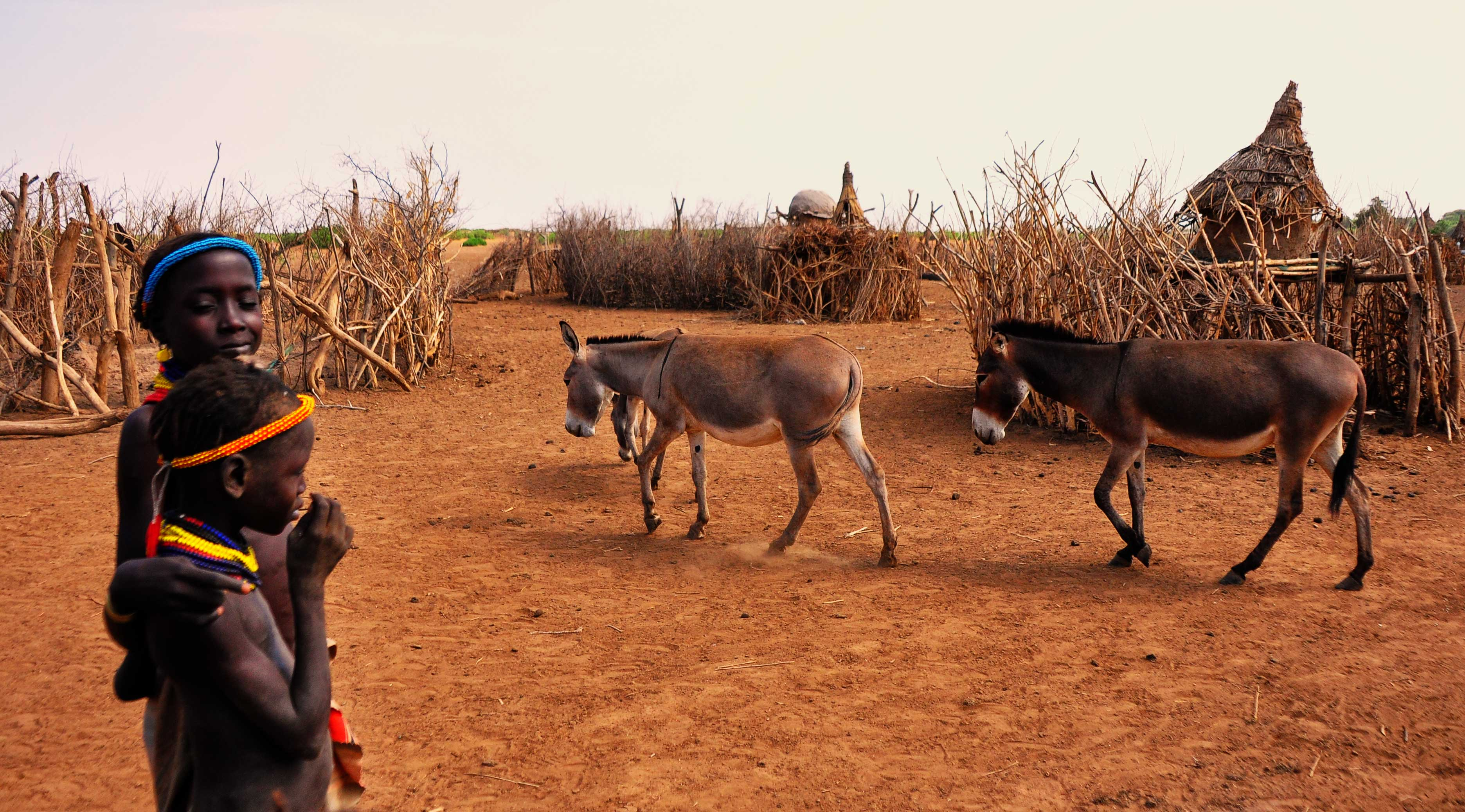 Ethiopia